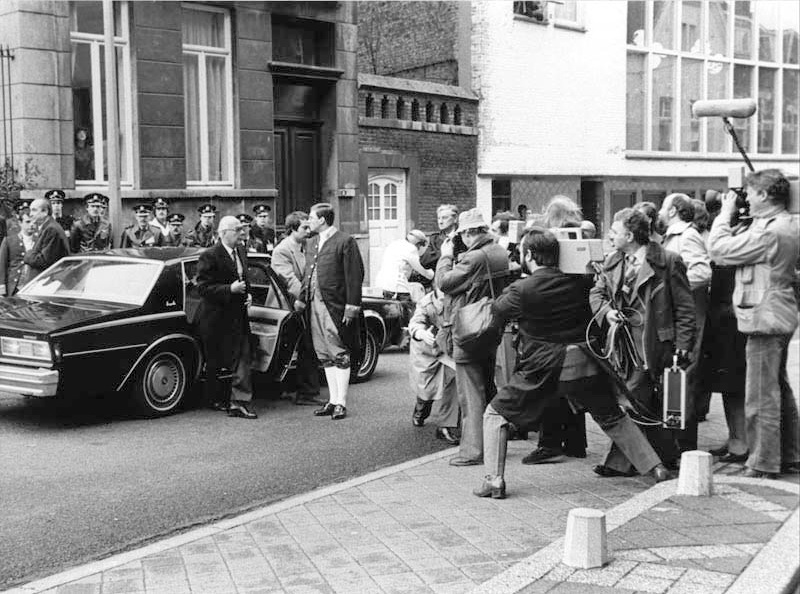 Aankomst van de Griekse premier Georgios Rallis bij het Gouvernementsgebouw in Maastricht bij gelegenheid van de 'Eurotop' van de Europese Raad, gehouden in het stadhuis van Maastricht op 23 en 24 maart 1981. Fotocollectie RHCL Maastricht, GAM 20885.